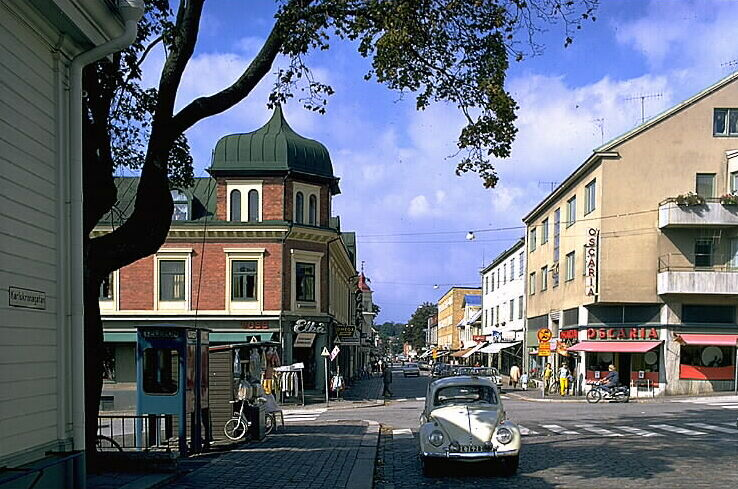 Staden på 1960-talet. Motiv: Ronneby Kategori: StadsmiljöStaden på 1960-talet.